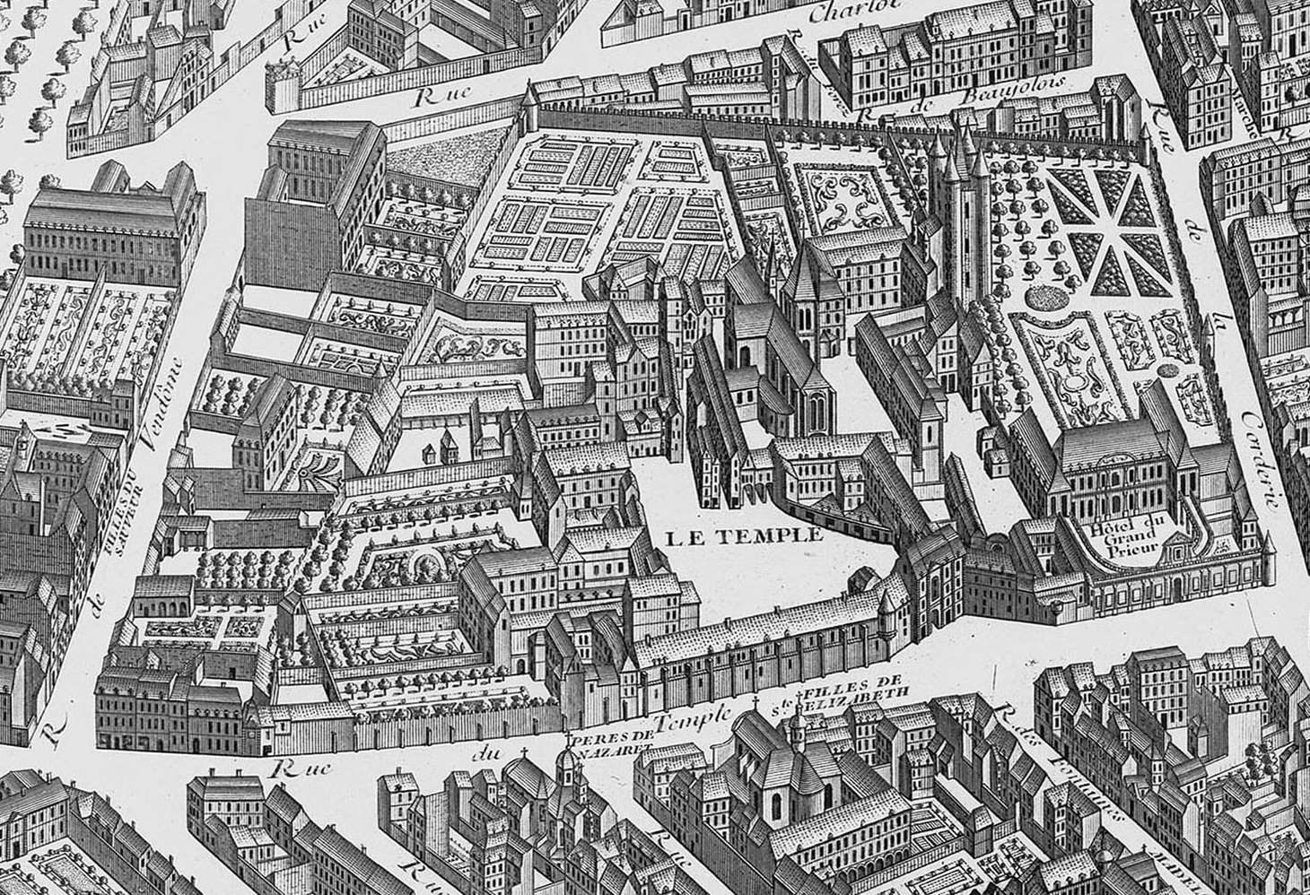 Quartier du Temple, en 1734, facsimilierter Stich, Ausschnitt aus dem sog. Plan Turgot